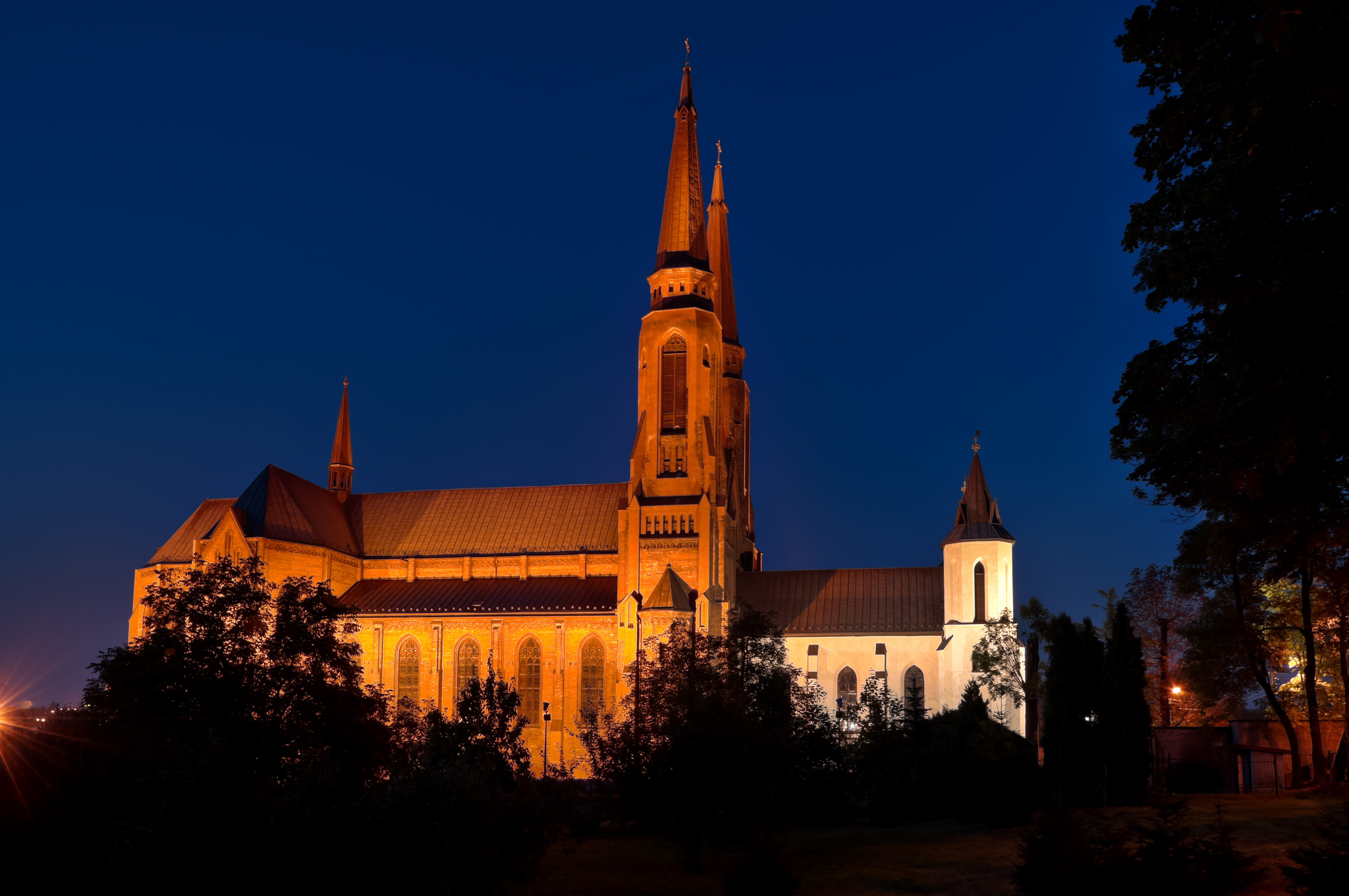 Kościół p.w. św. Joachima w nocy, Sosnowiec- A-18/60 z 23.02.1960 i A/166/06 z 11.01.2006